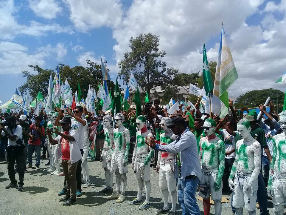 Wahlkampfveranstaltung der AMP in Manatuto, Osttimor